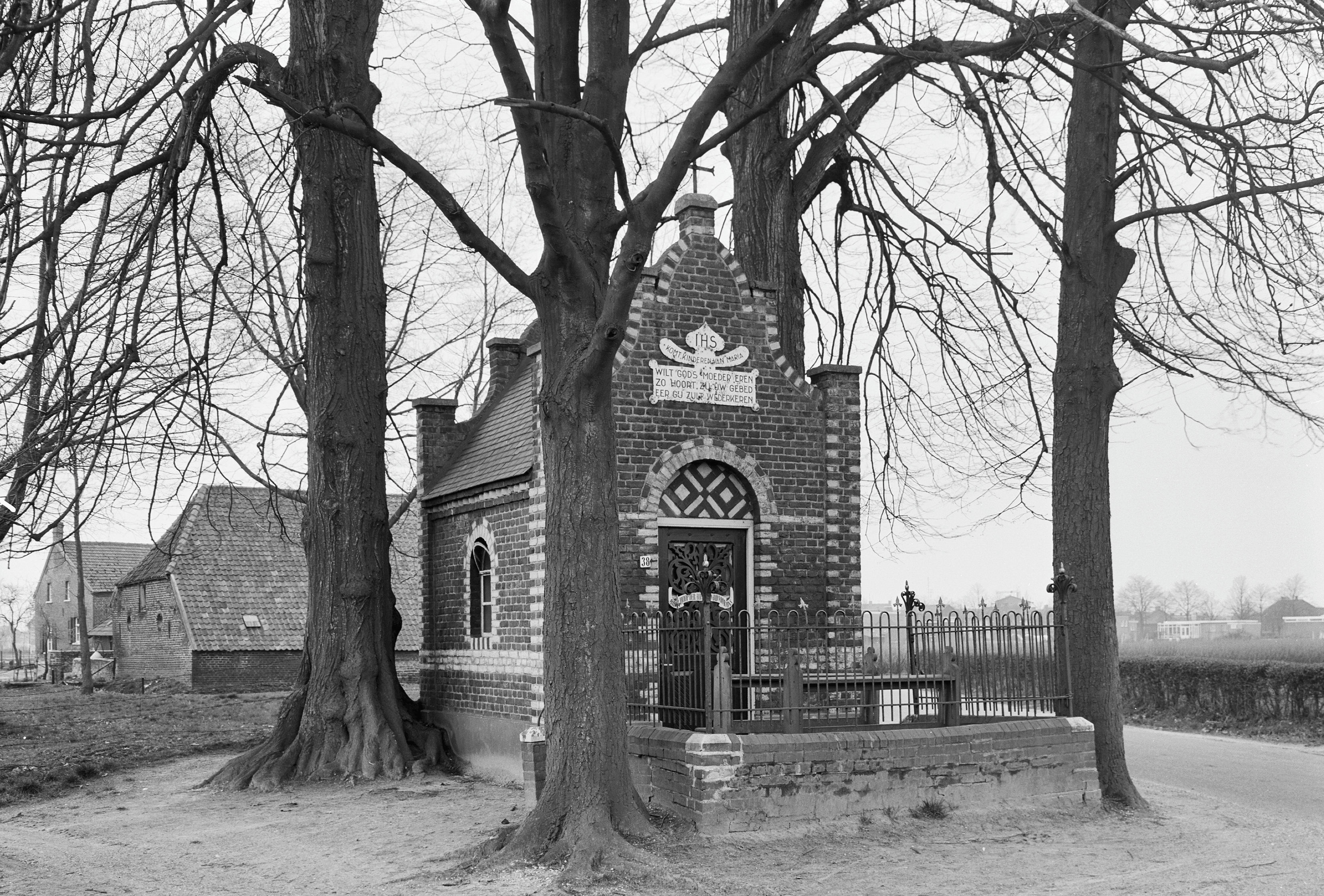 aanzicht kapel